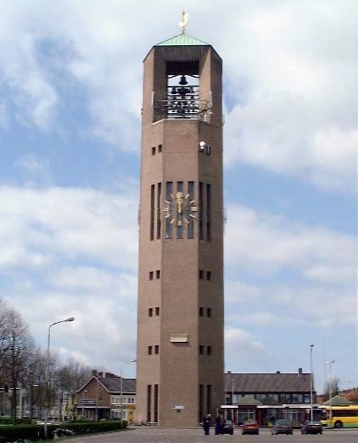 De Poldertoren van Emmeloord. Foto: Evert de Graaff - Zelfgemaakte media